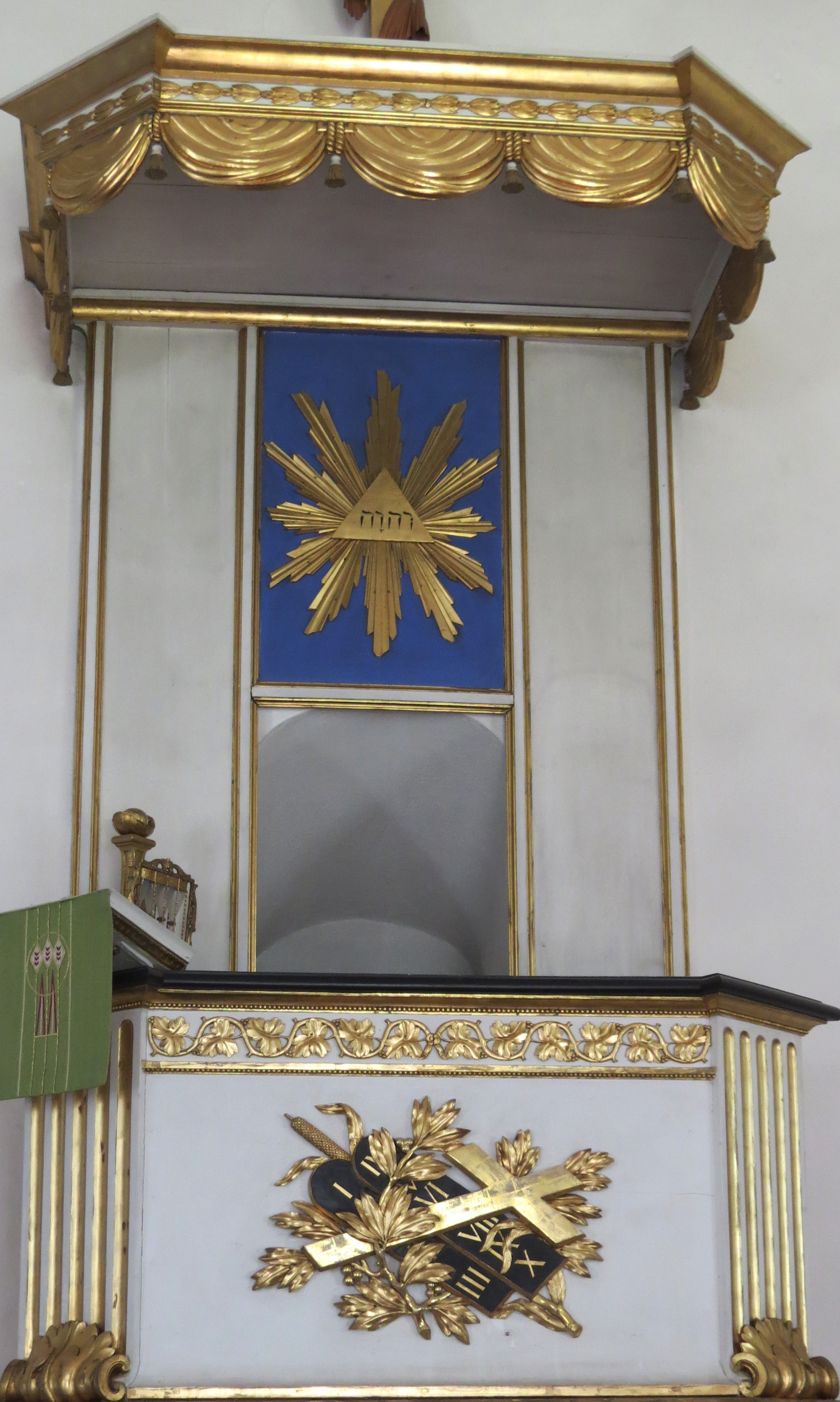 Predikstol från 1802, gjord av Carl Fredrik Beurling, i Rappestad kyrka